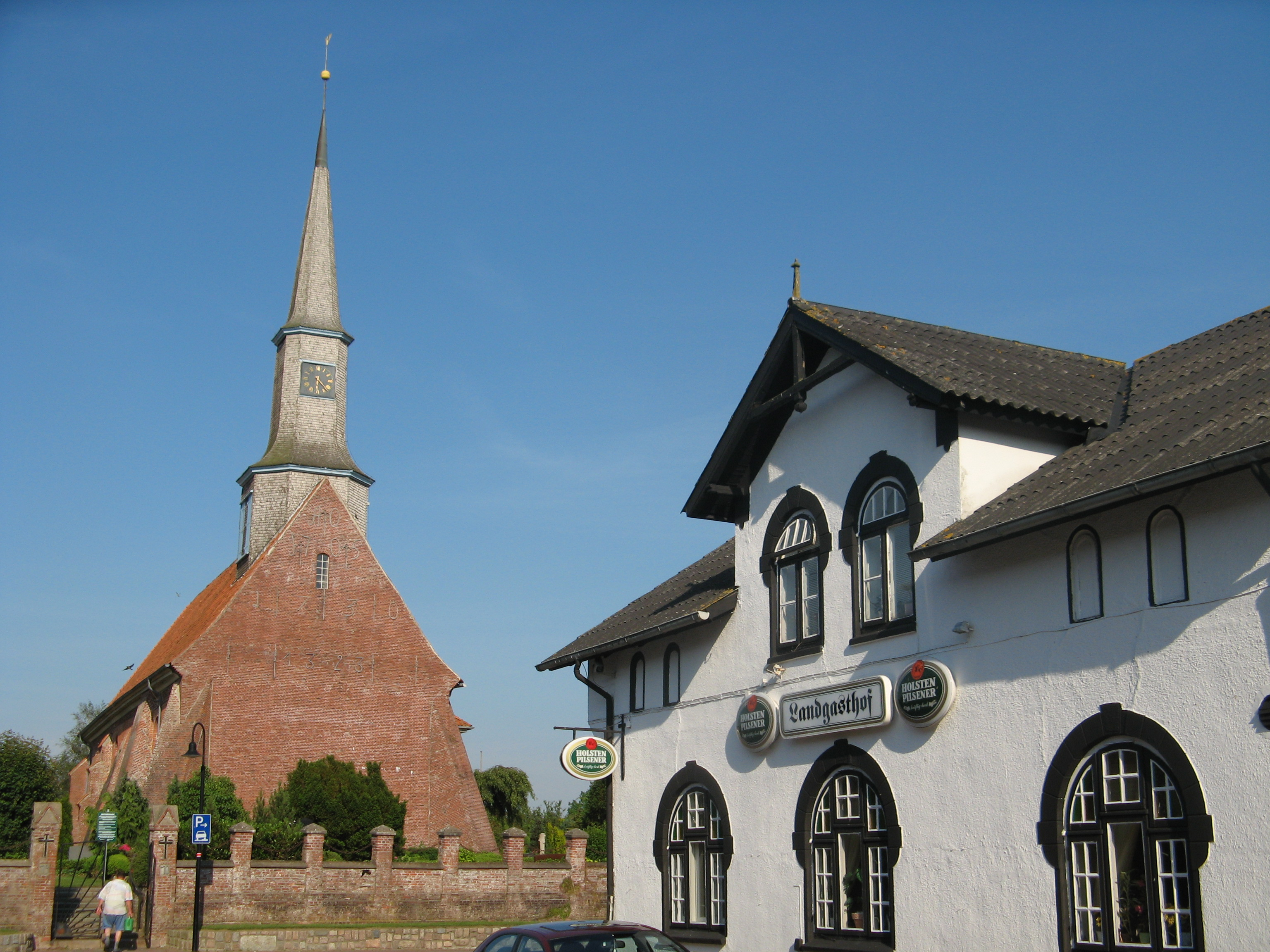 Neuenkirche Kirche und Gasthof im Ortszentrum